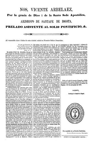 Pastoral del Arzobispo Arbelaez de 1868